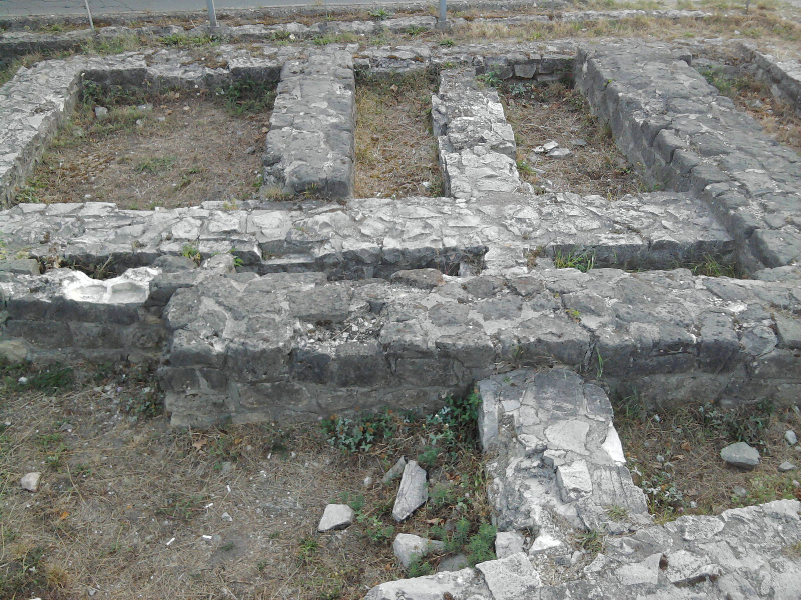 Cella trichora (Budapest 3, Raktár utca, Hunor utca sarka, Körte utca, Kunigunda utca)